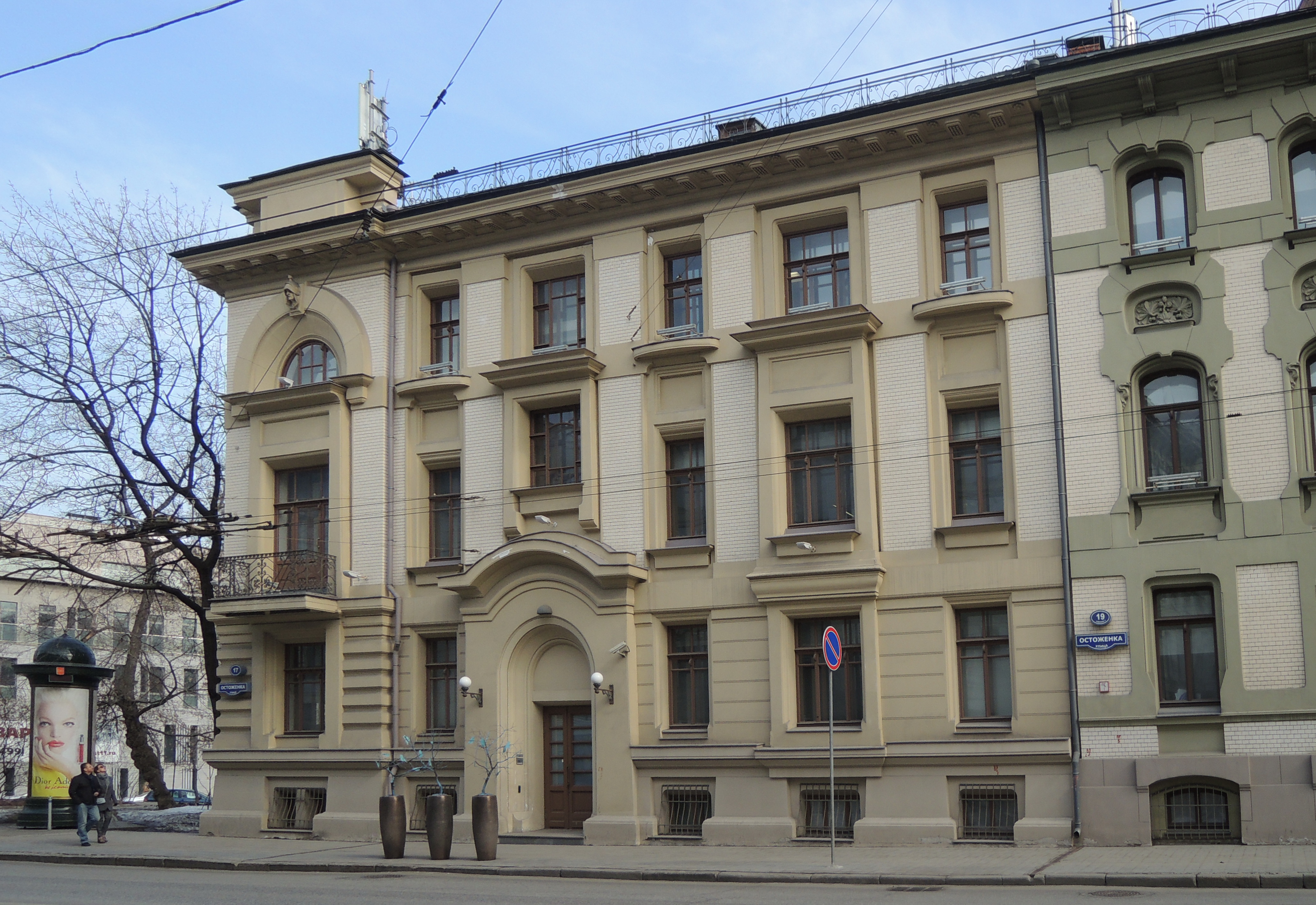 ул. Остоженка